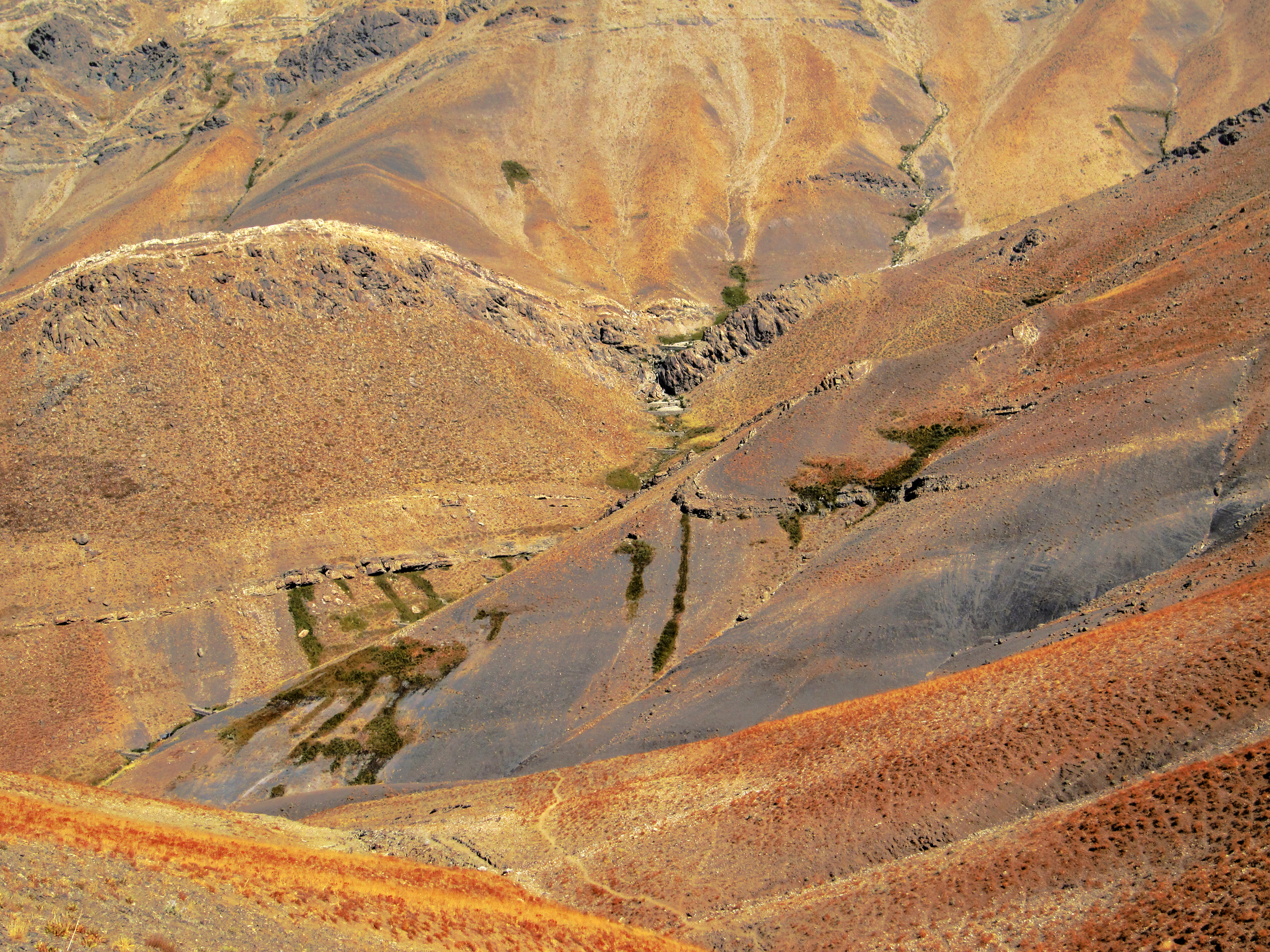 Kolakchal - Piyazchal